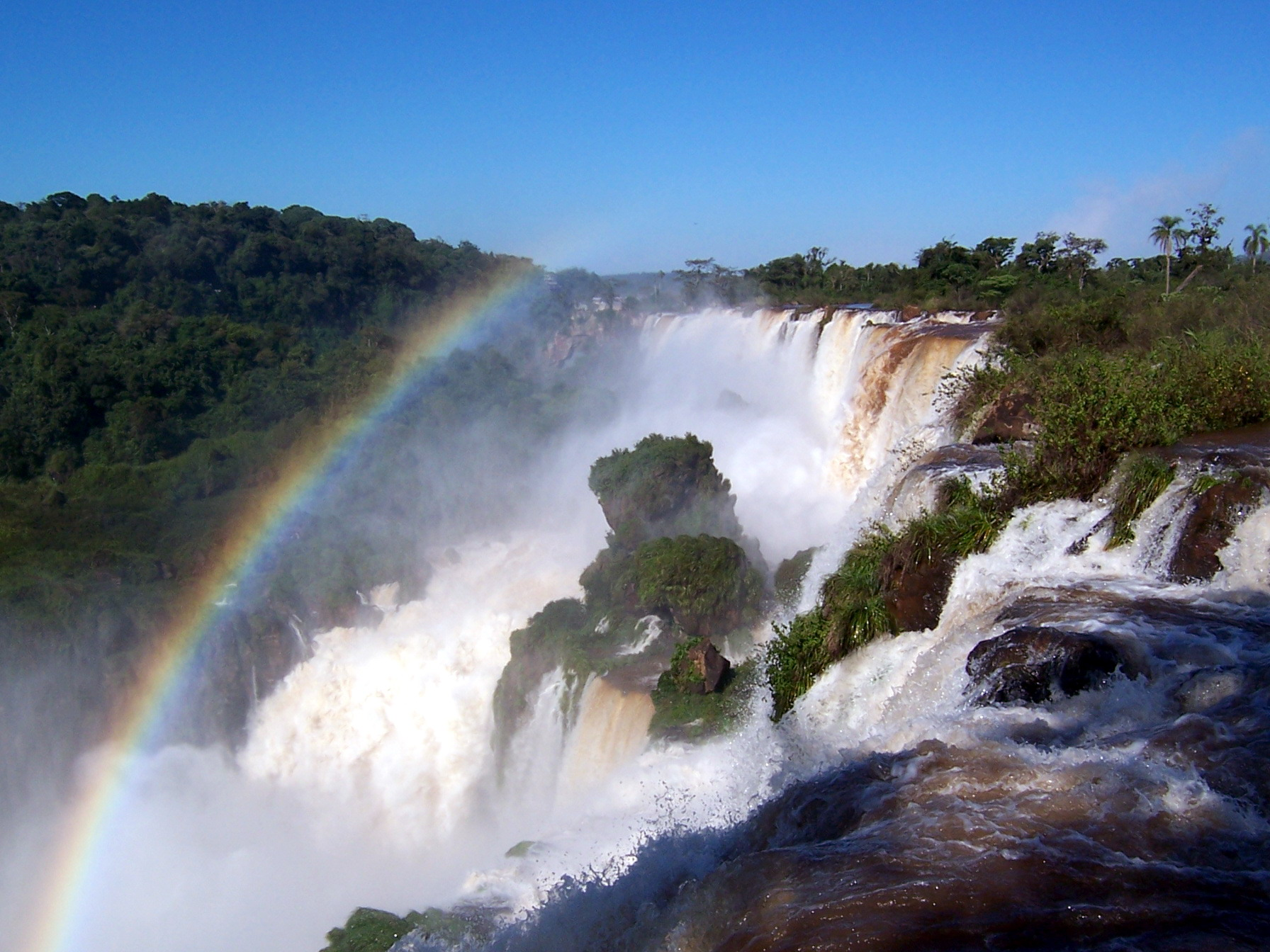 Blick von der argentinischen Seite auf den mittleren Teil der Wasserfälle von Iguaçu